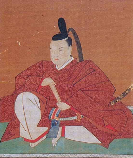 京極高和。Kyogoku Takakazu.